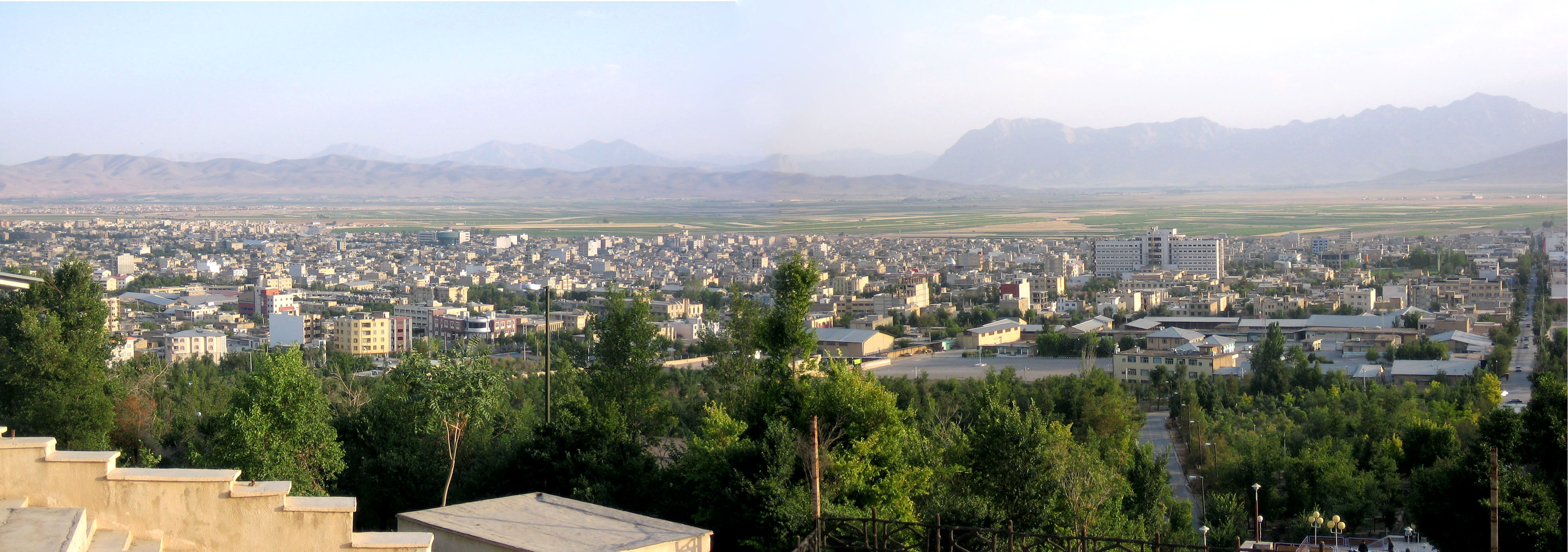 پانوراما شهركرد